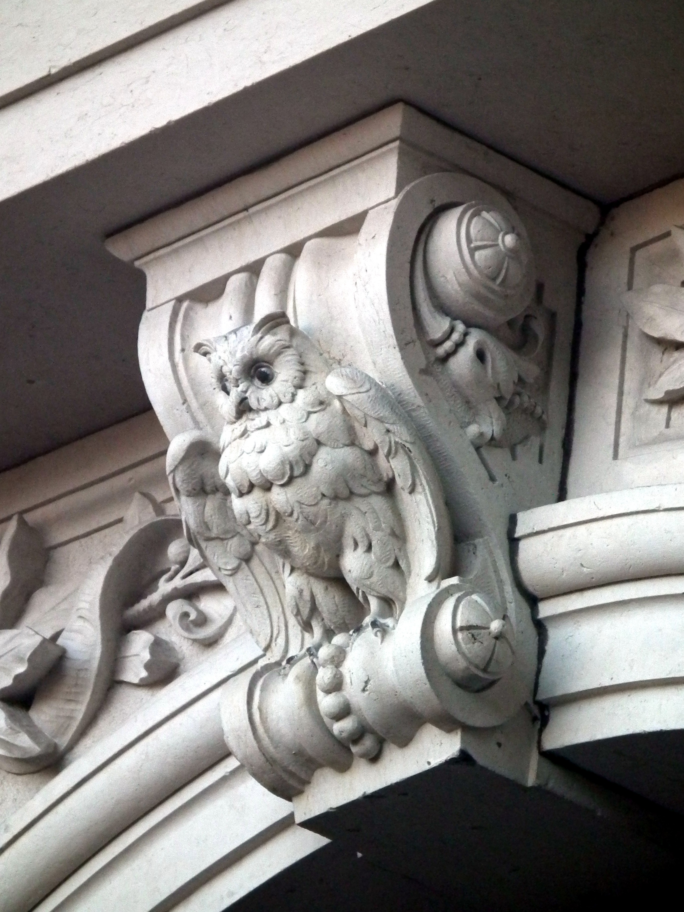 Gymnasium Dresden-Plauen, Haupteingang, Schlussstein